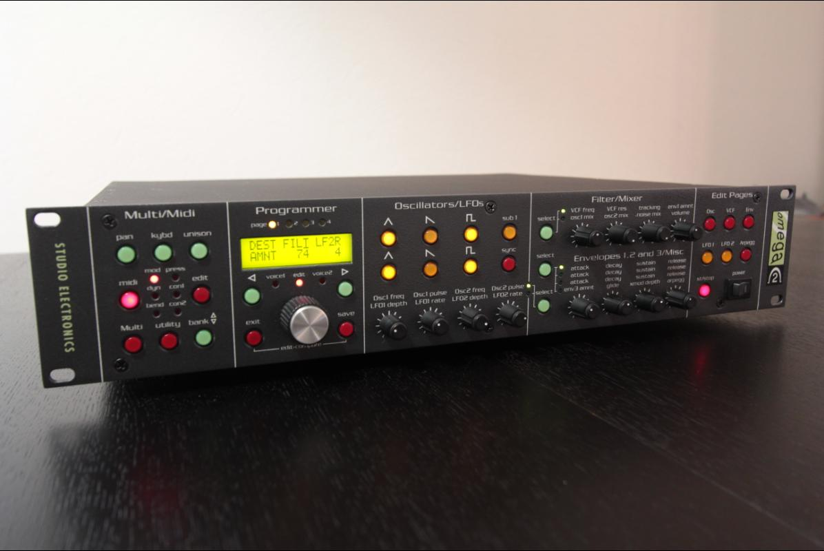 Synthetiseur Omega 2 de la marque Studio Electronics